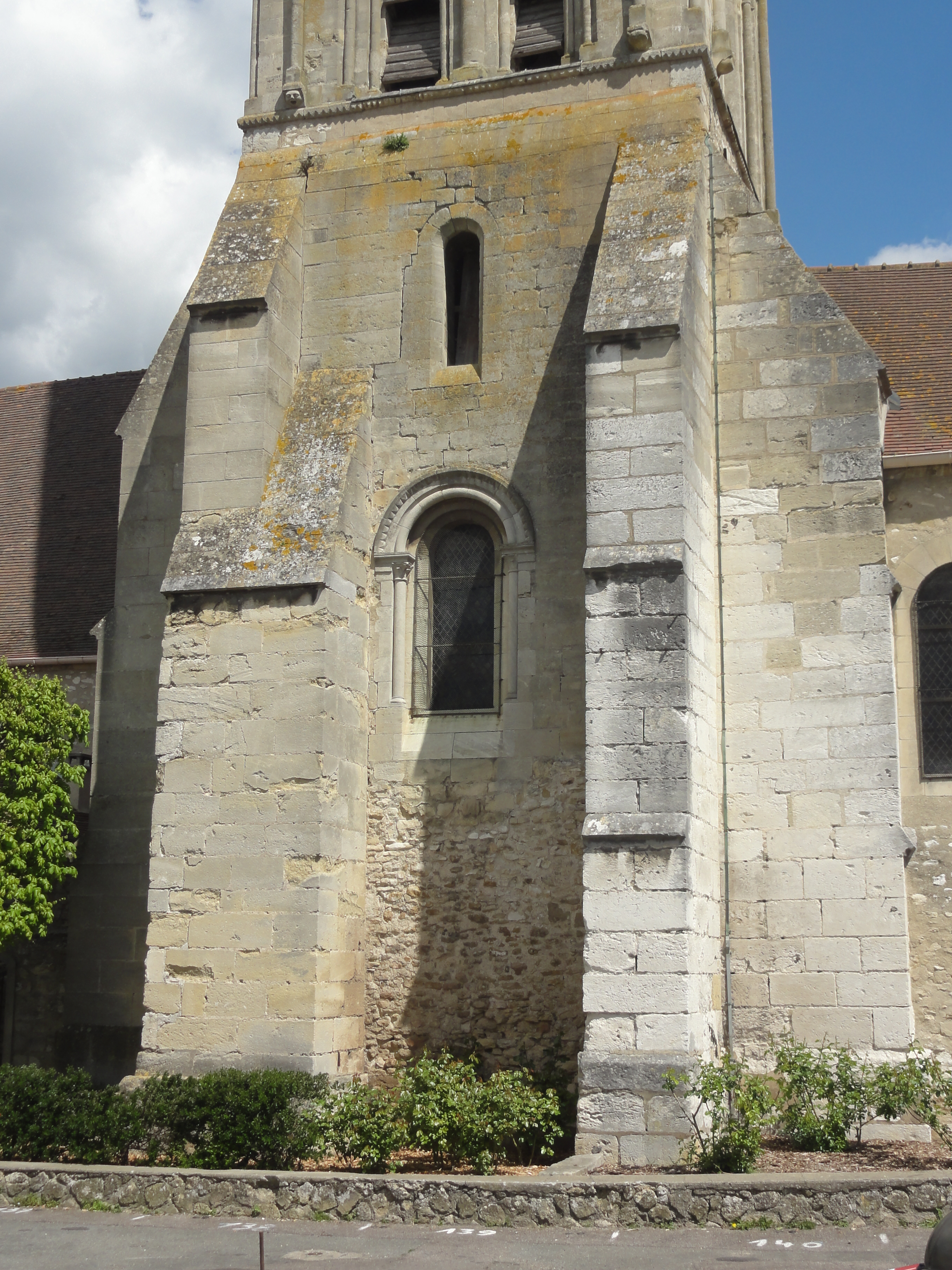 Église Saint-Aubin de Limay - voir titre.